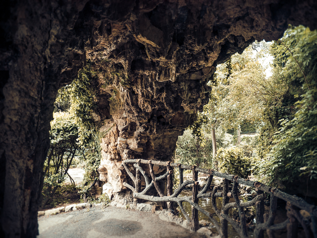 Villetta Di Negro passaggi in grotta tipici della villa This is a photo of a monument which is part of cultural heritage of Italy.